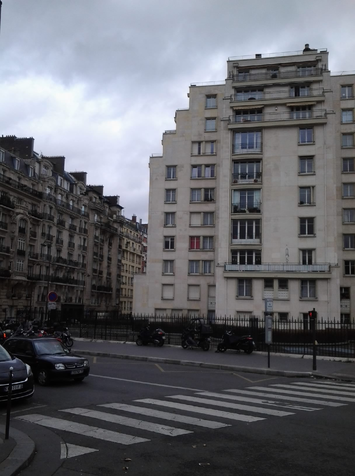 Emplacement de l'ancienne gare "Courcelles Ceinture", à l'intersection des rues Verniquet et Alfred Roll (Paris 17e) - 4 janvier 2014.